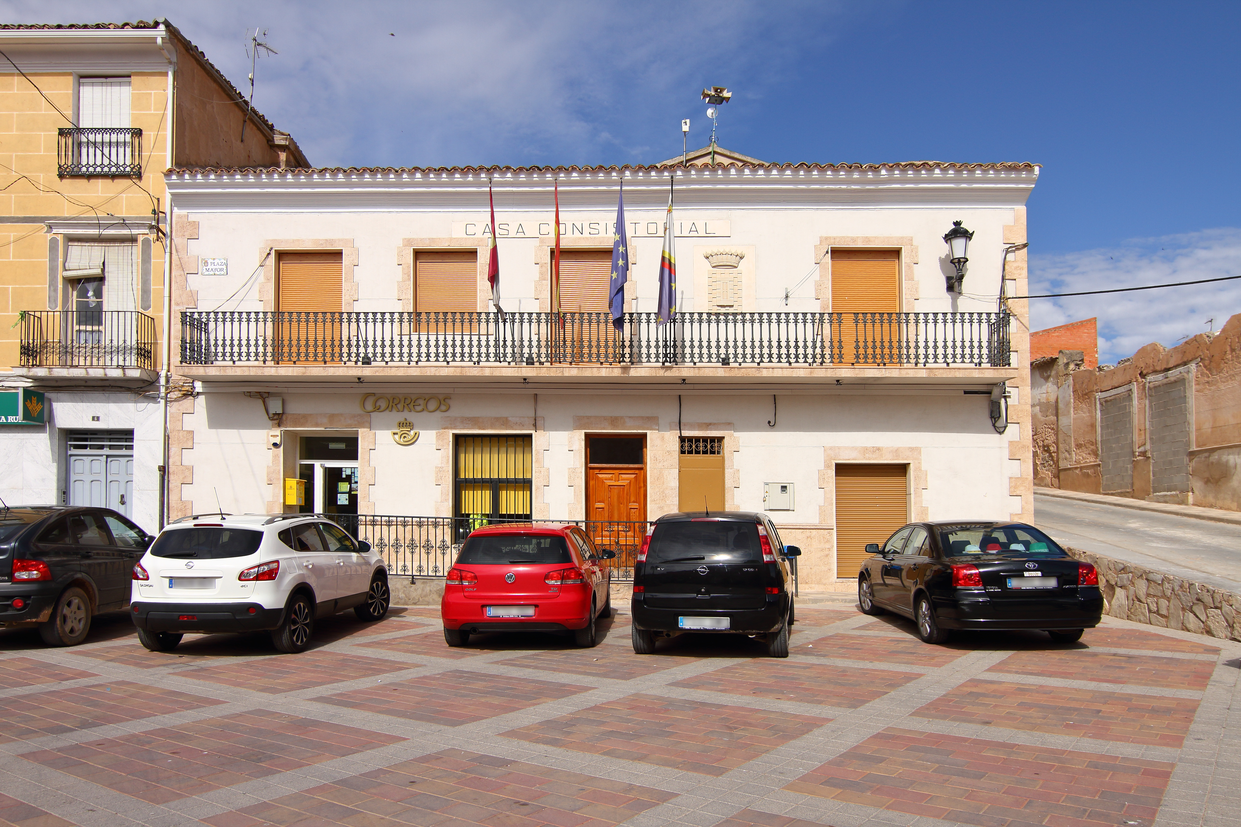 Valverde de Júcar, Casa Consitorial